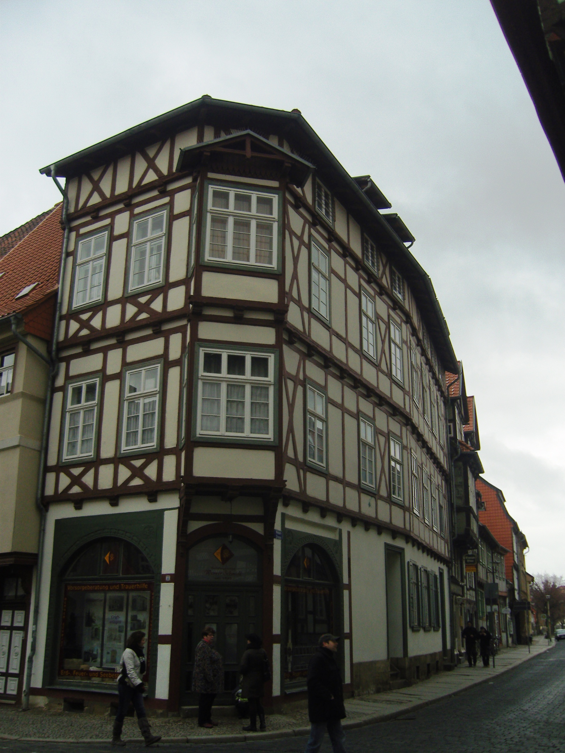 Denkmalgeschütztes Wohn- und Geschäftshaus in der Weberstraße 1 in Quedlinburg, gesehen vom Steinweg